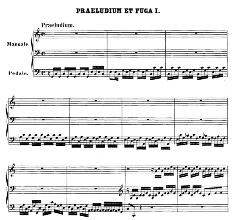 Inici del Preludi i fuga en do major, BWV 531 de JS Bach.